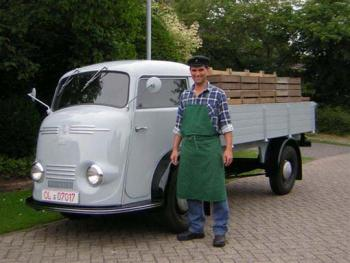 Tempo Matador (1952–1955), restauriert von F. Gries, ausführliche Beschreibung siehe URL